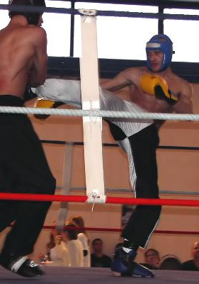 full-contact2.jpg